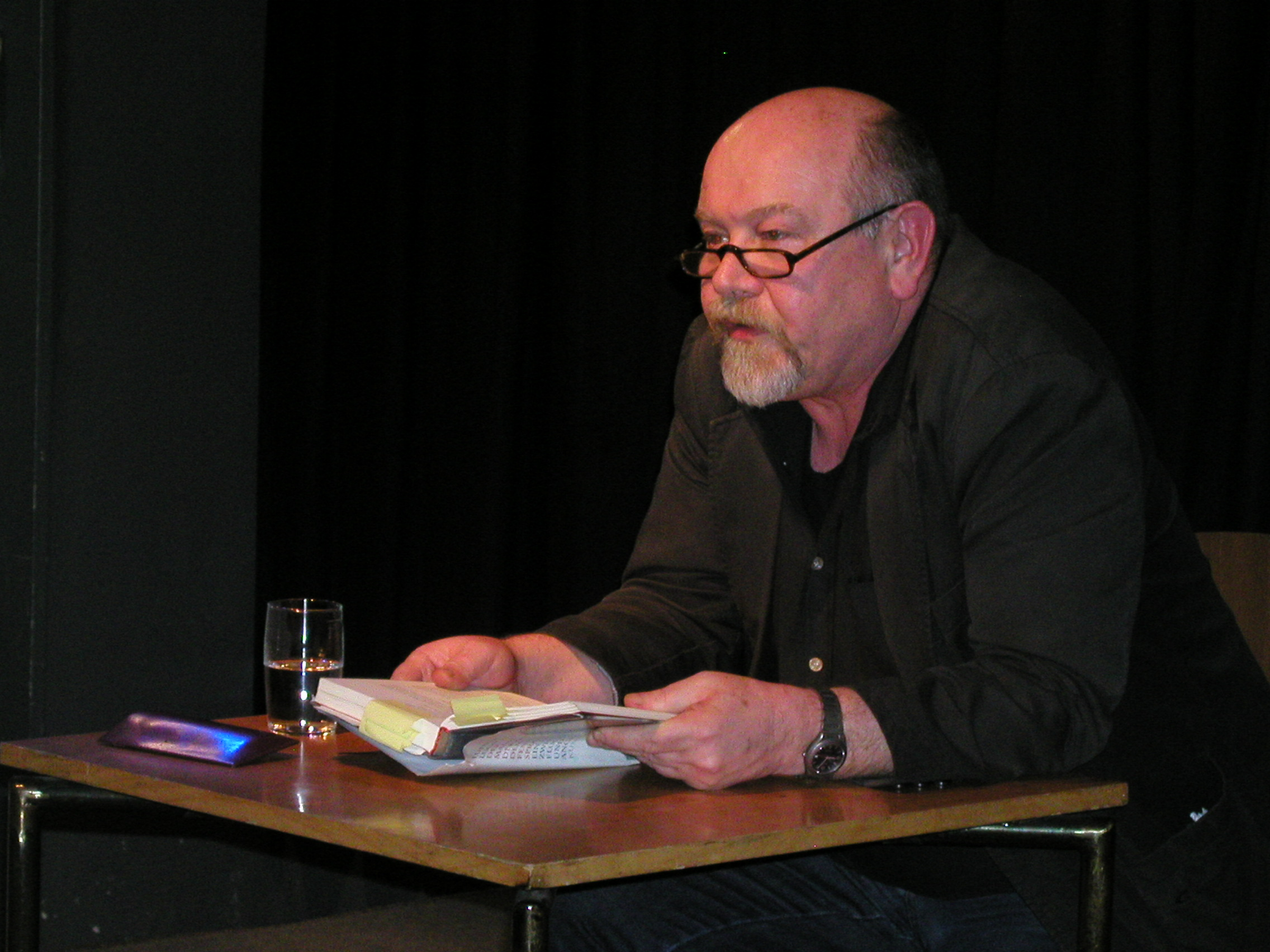 Lesung mit Ludwig Lugmeier im Club W71 in Weikersheim